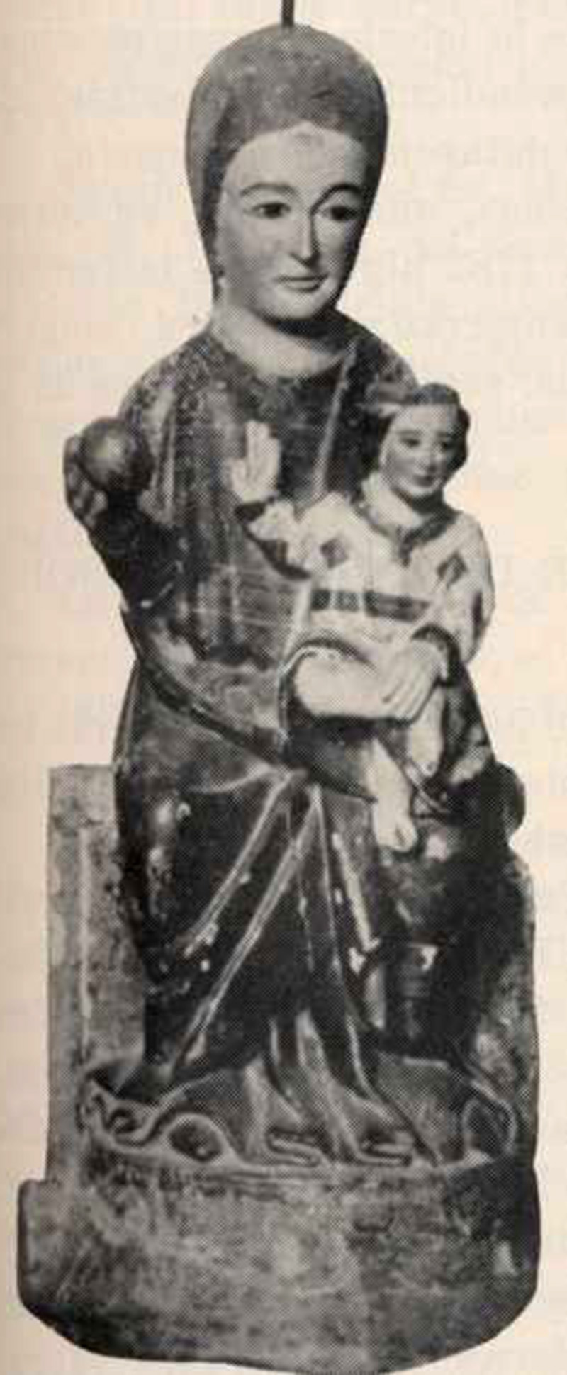 Virgen del Espino, talla original. Fotografía realizada antes de 1952.